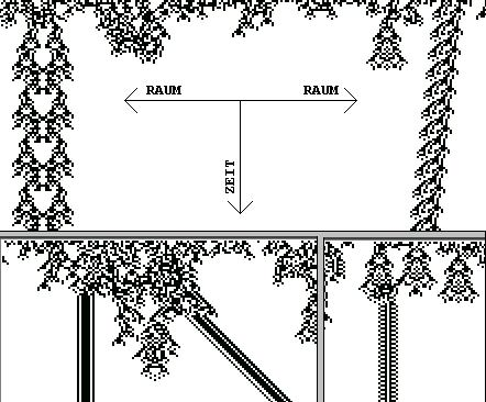 Stephen Wolfram's 1-dimensionales Universum Stephen Wolfram's 1-dimensionales Universum ist ein zellulärer Automat mit nur einer Raum- und einer Zeit-Dimension. Die hier abgebildete Version entspricht der Regel 1771476584 in einem Universum bei dem eine Nachbarschaft mit dem Radius 2 definiert ist. Gezeichnet am 19. Januar 2002 Benutzer:Karl Bednarik Andere Versionen: keine Copyright Status: GNU Freie Dokumentationslizenz Externer Link